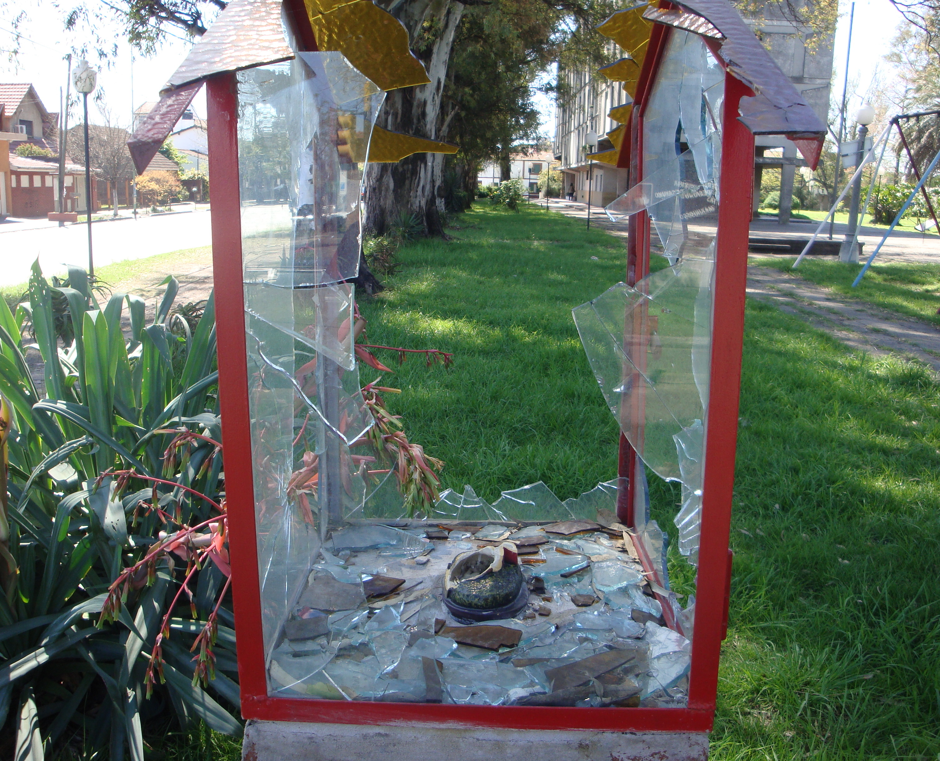 Vandalismo sobre una imagen religiosa en la vía pública.